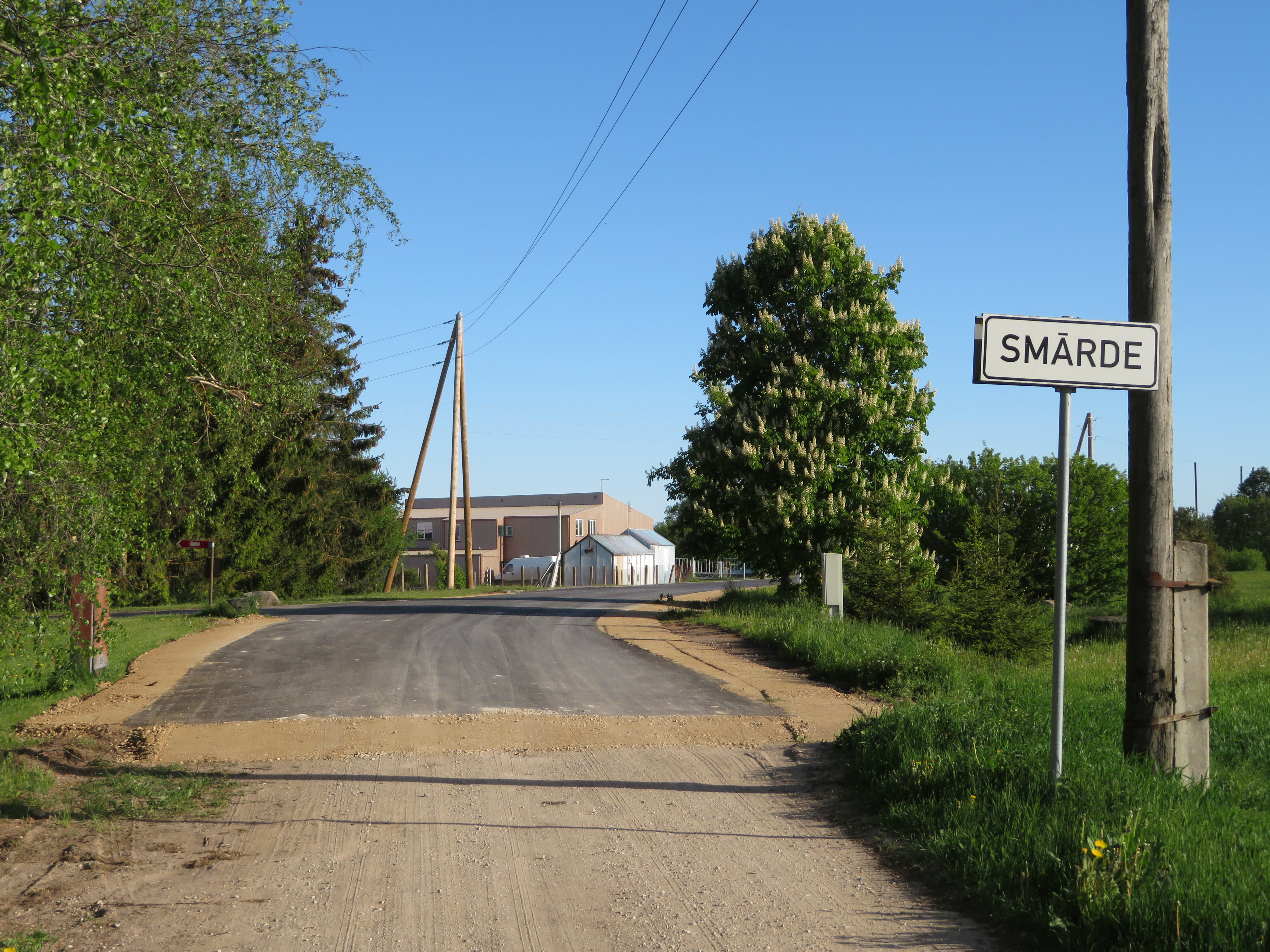 Smārdes ciema robeža (Jaunā iela)